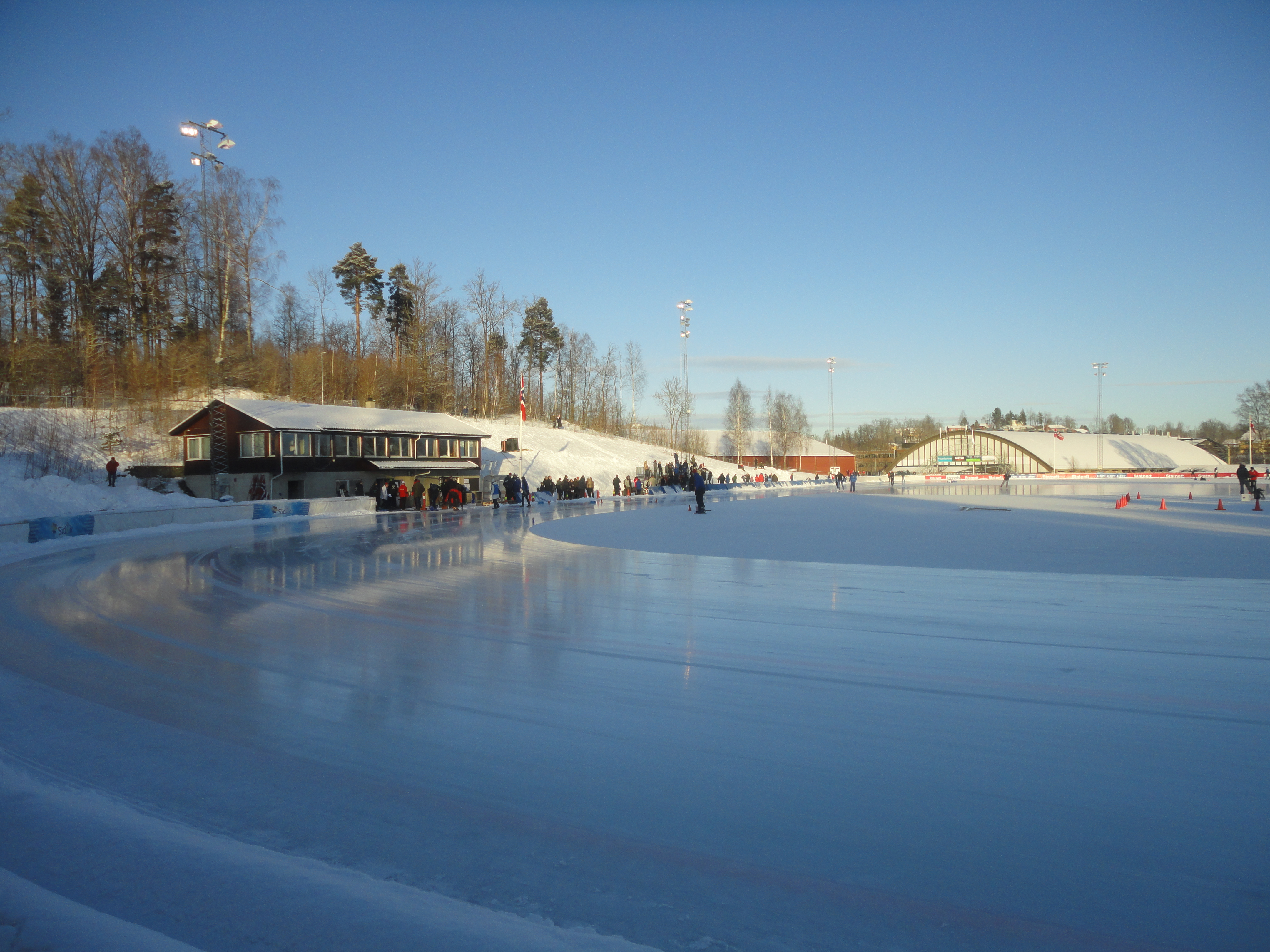 Risenga Kunstisbane søndag 8. jan 2012 under Sprint-NM på skøyter 2012 med Asker Skøyteklubb's klubbhus nærmest til venstre og Ishockeyhallen i bakgrunn til høyre.UnknownUnknown risenga artificial ice stadium on sunday 8th january 2012 during the sprint speed ​​skating championships 2012 by asker skøyteklubb's clubhouse closest to the left and hockey hall in background right.